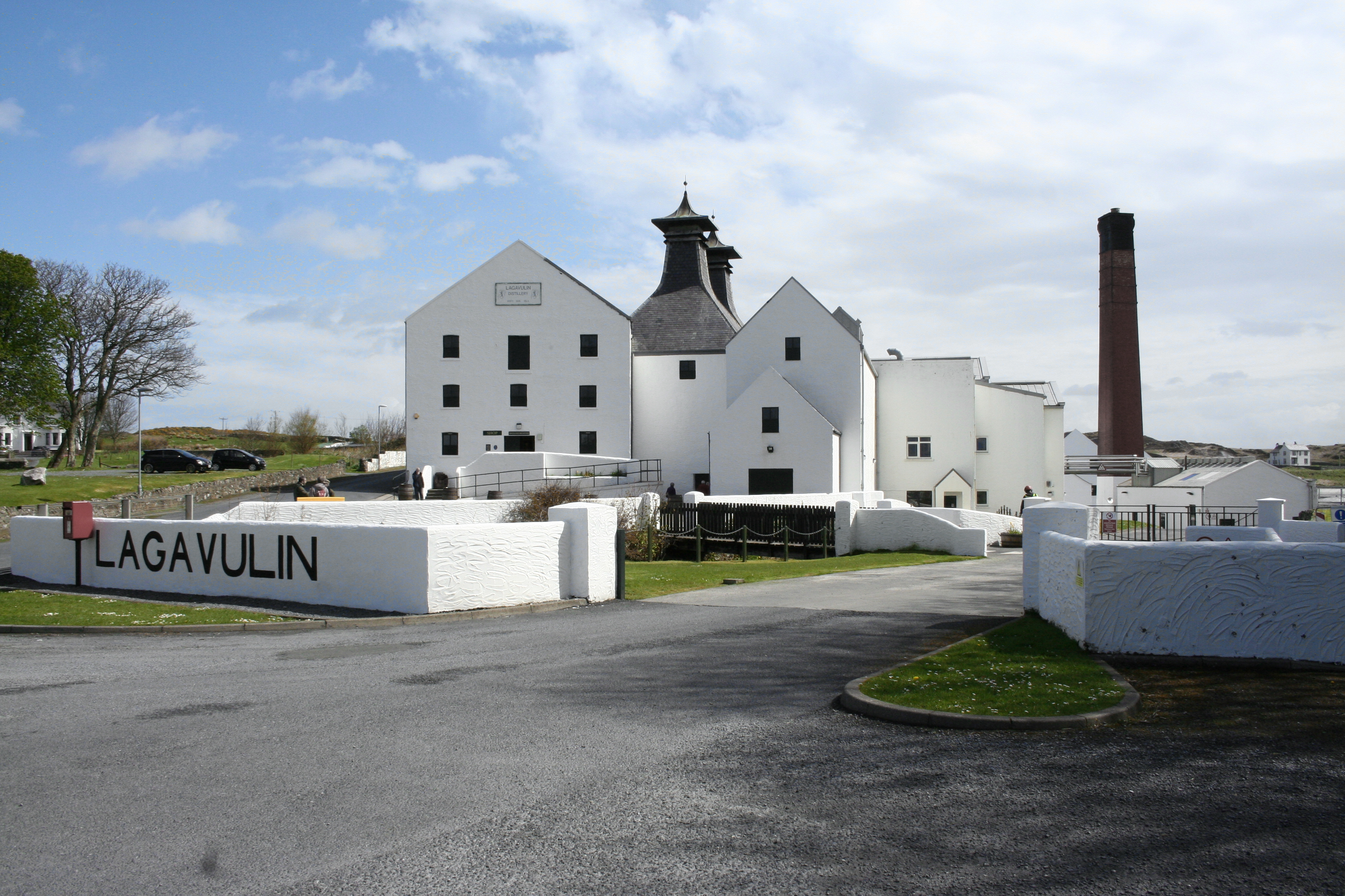 Gebäude der Lagavulin Distillery (Mehr Informationen).